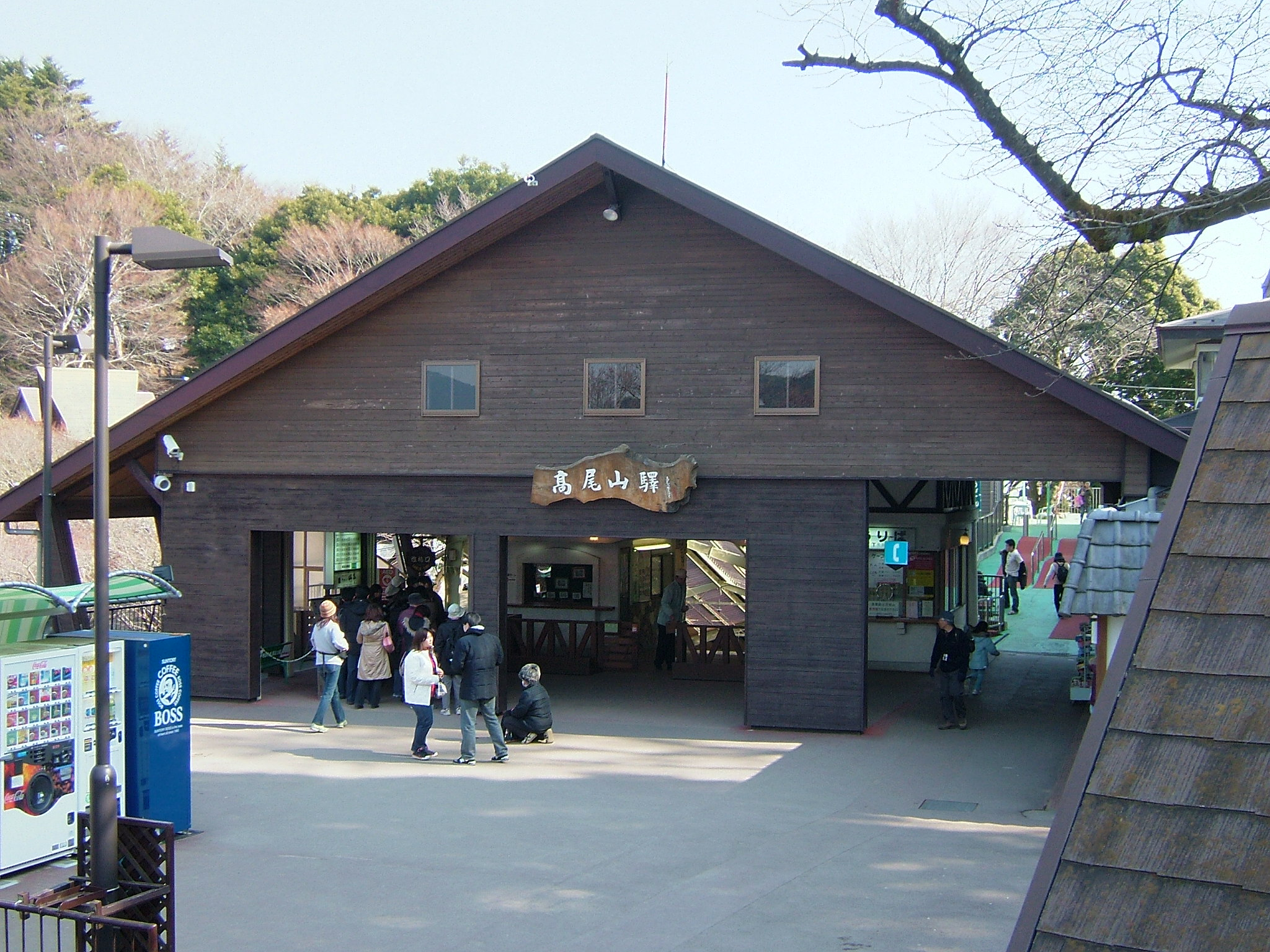 高尾登山電鉄ケーブルカー高尾山駅